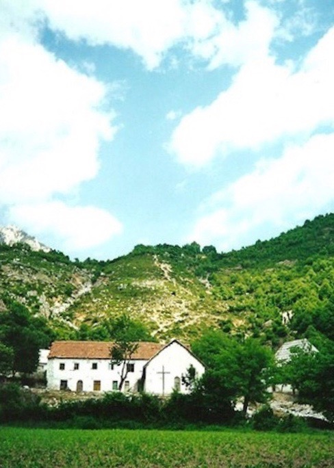 Kisha e Shalës në Abat (e vjetra).